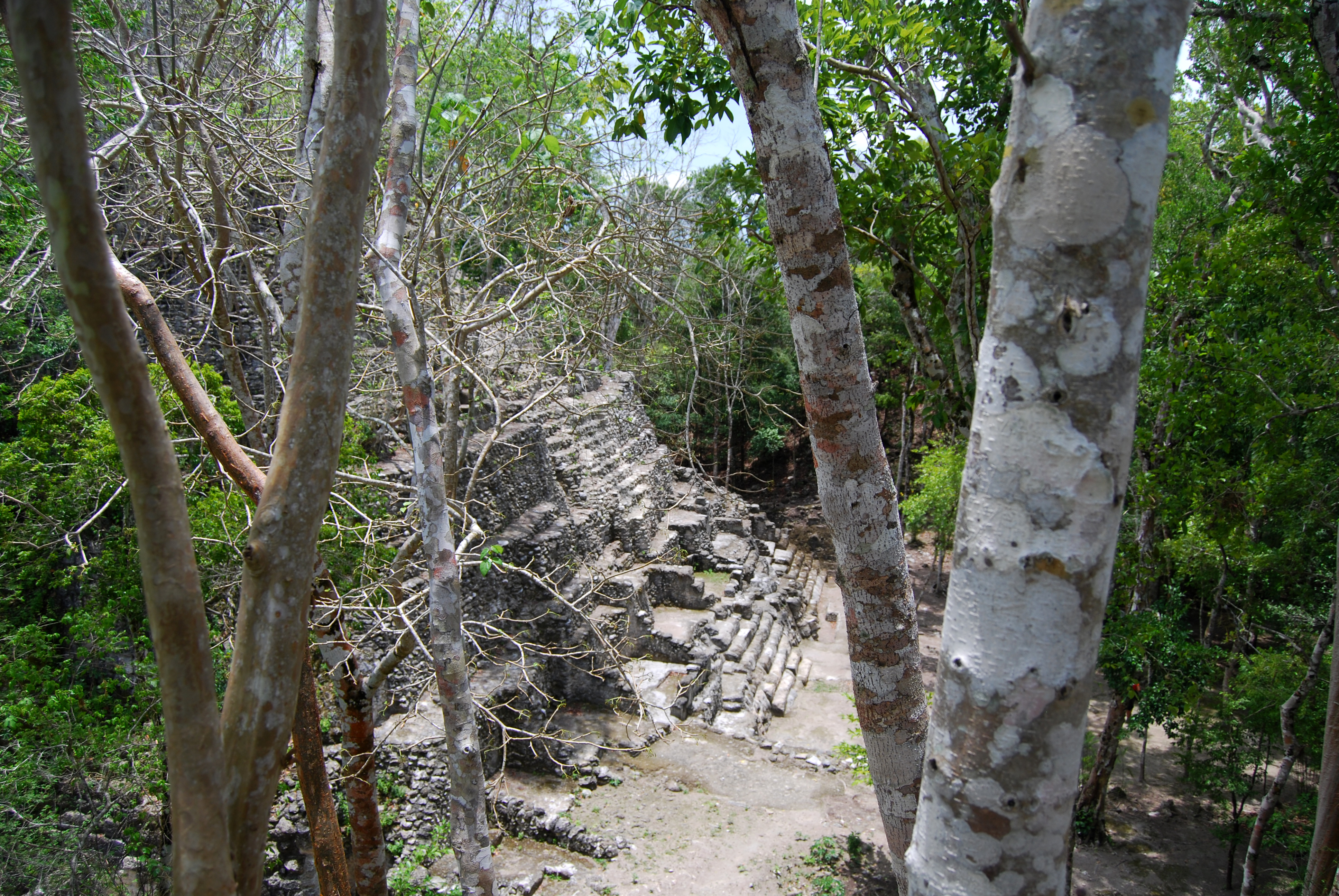 El Mirador